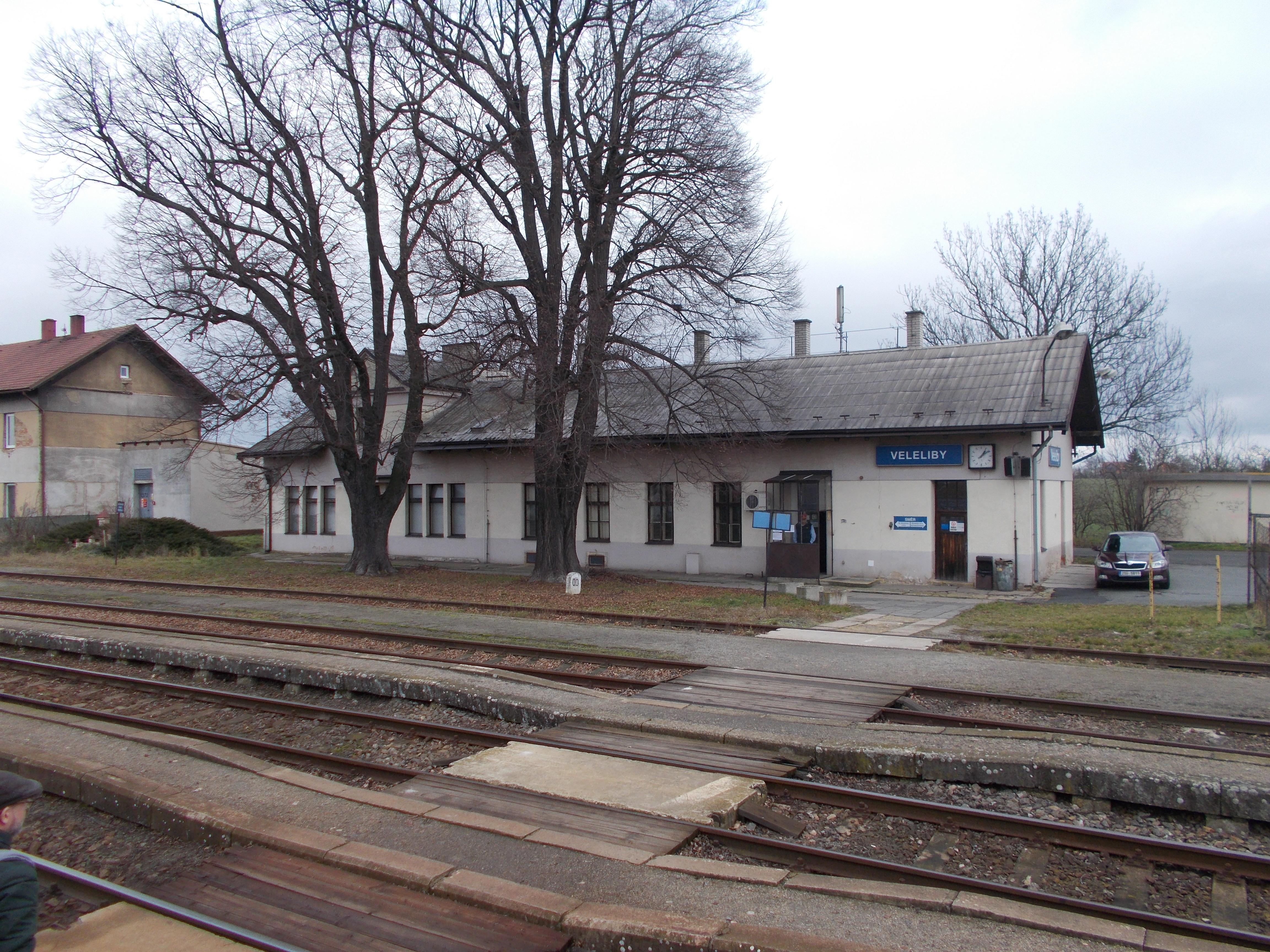 Staniční budova